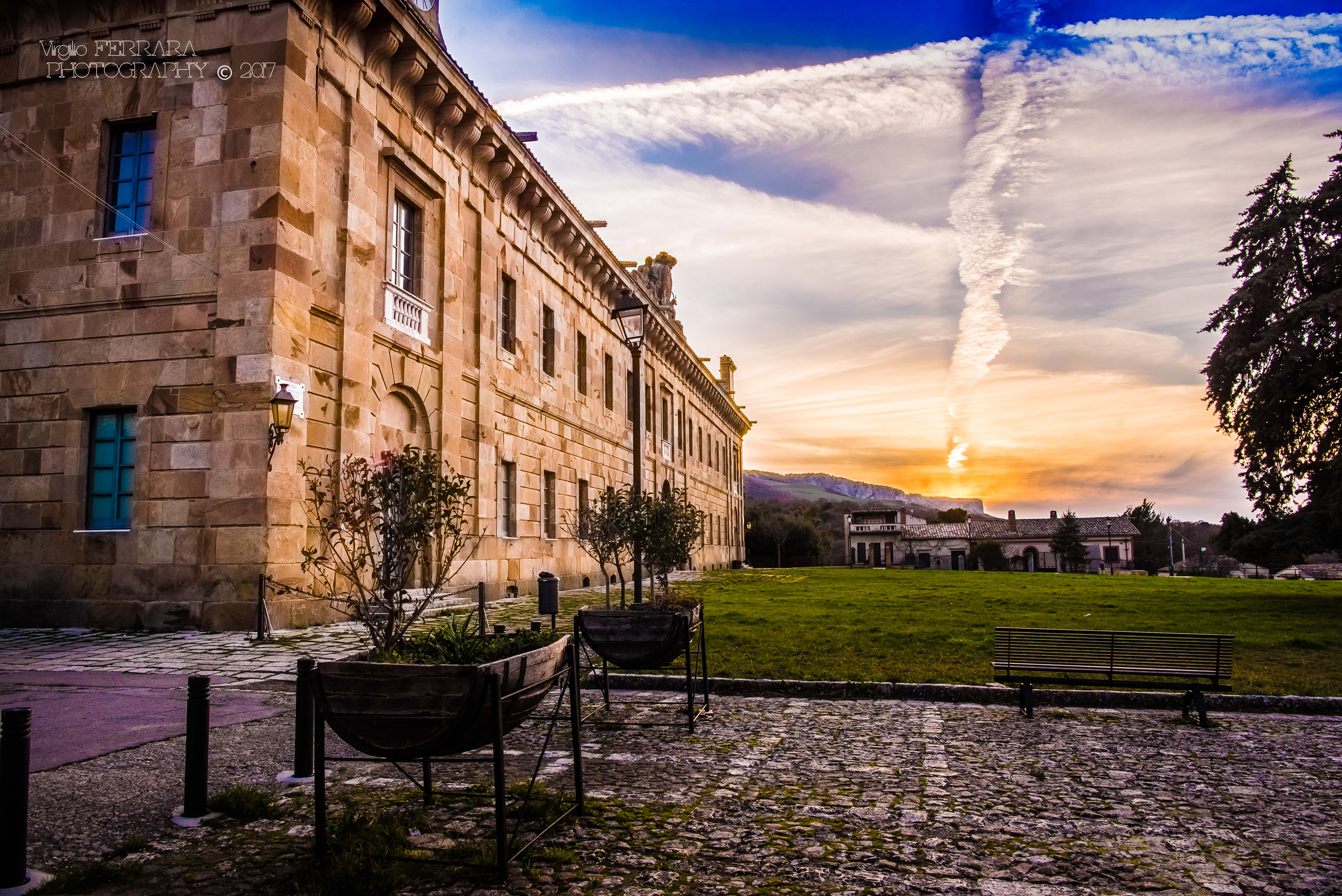 Tramonto sul Palazzo Reale di Ficuzza